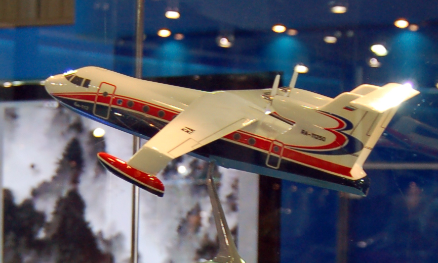 Макет самолёта Бе-112 на МАКС-2009